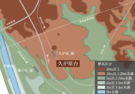 久が原台の標高